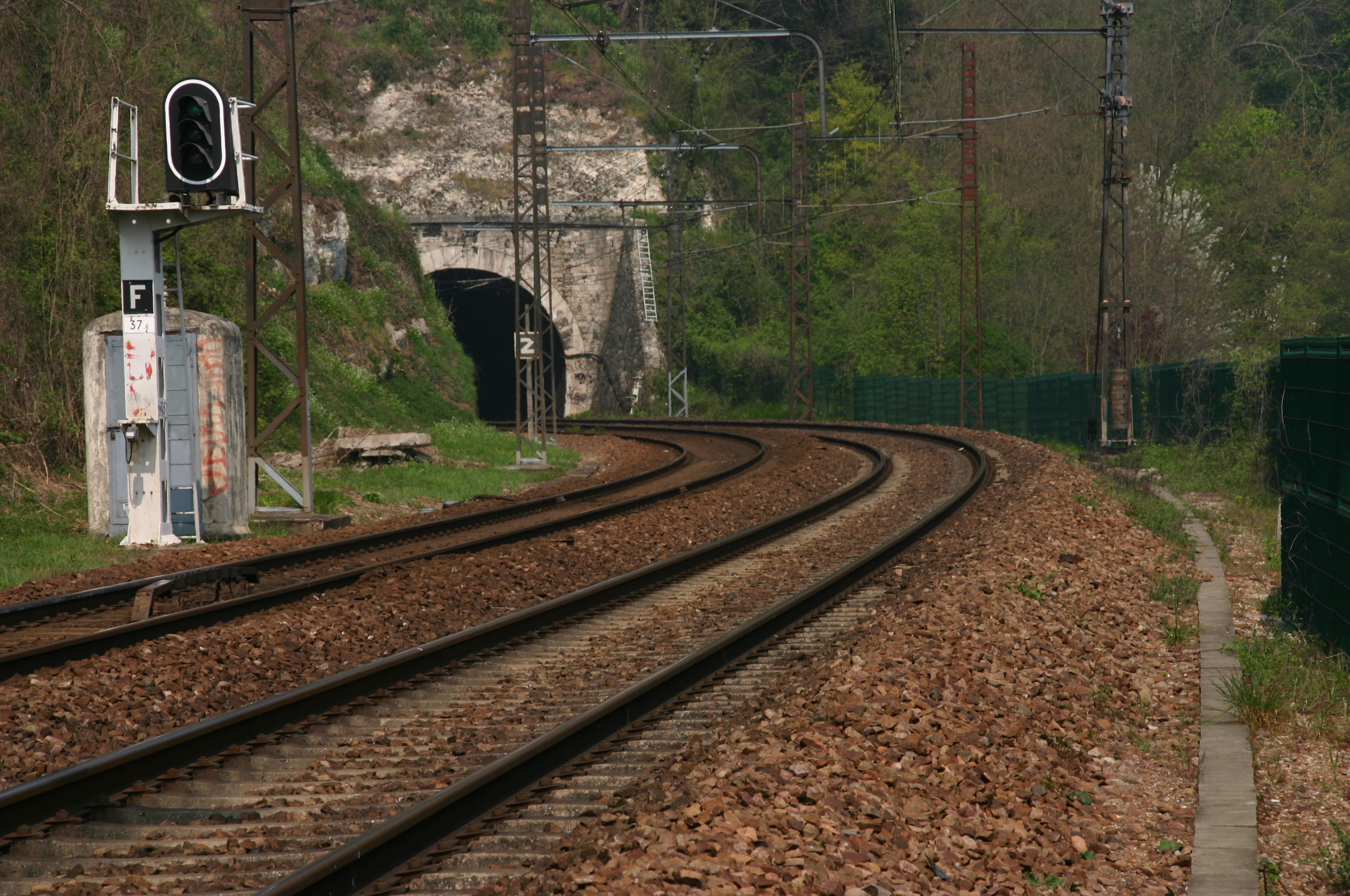 La gare du Plessis-Chenêt à Coudray-Montceaux (Essonne, France).